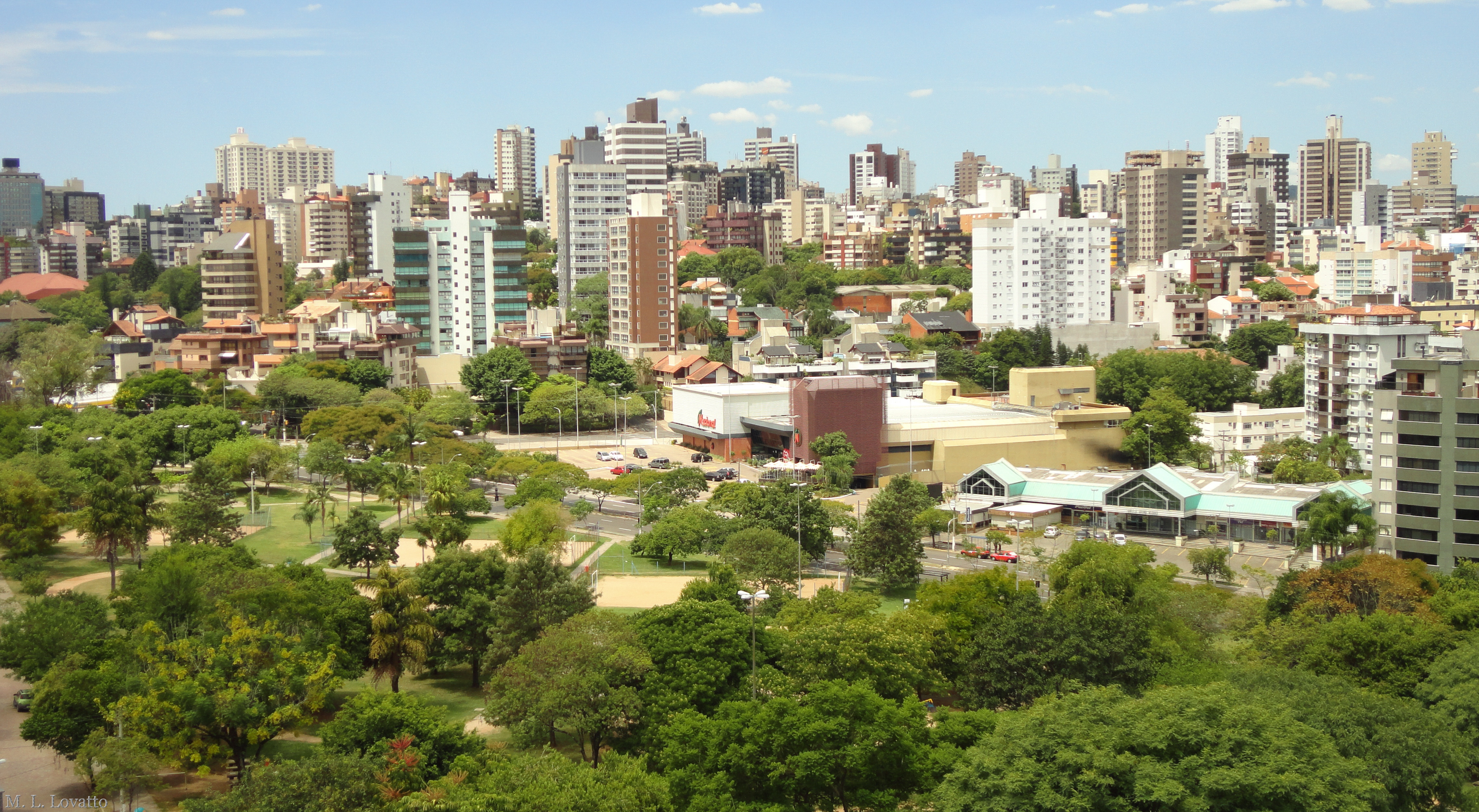 Vista para o leste (da Rua Jaraguá para a Avenida Nilópolis) da Praça da Encol, em Porto Alegre.